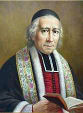 chaminade